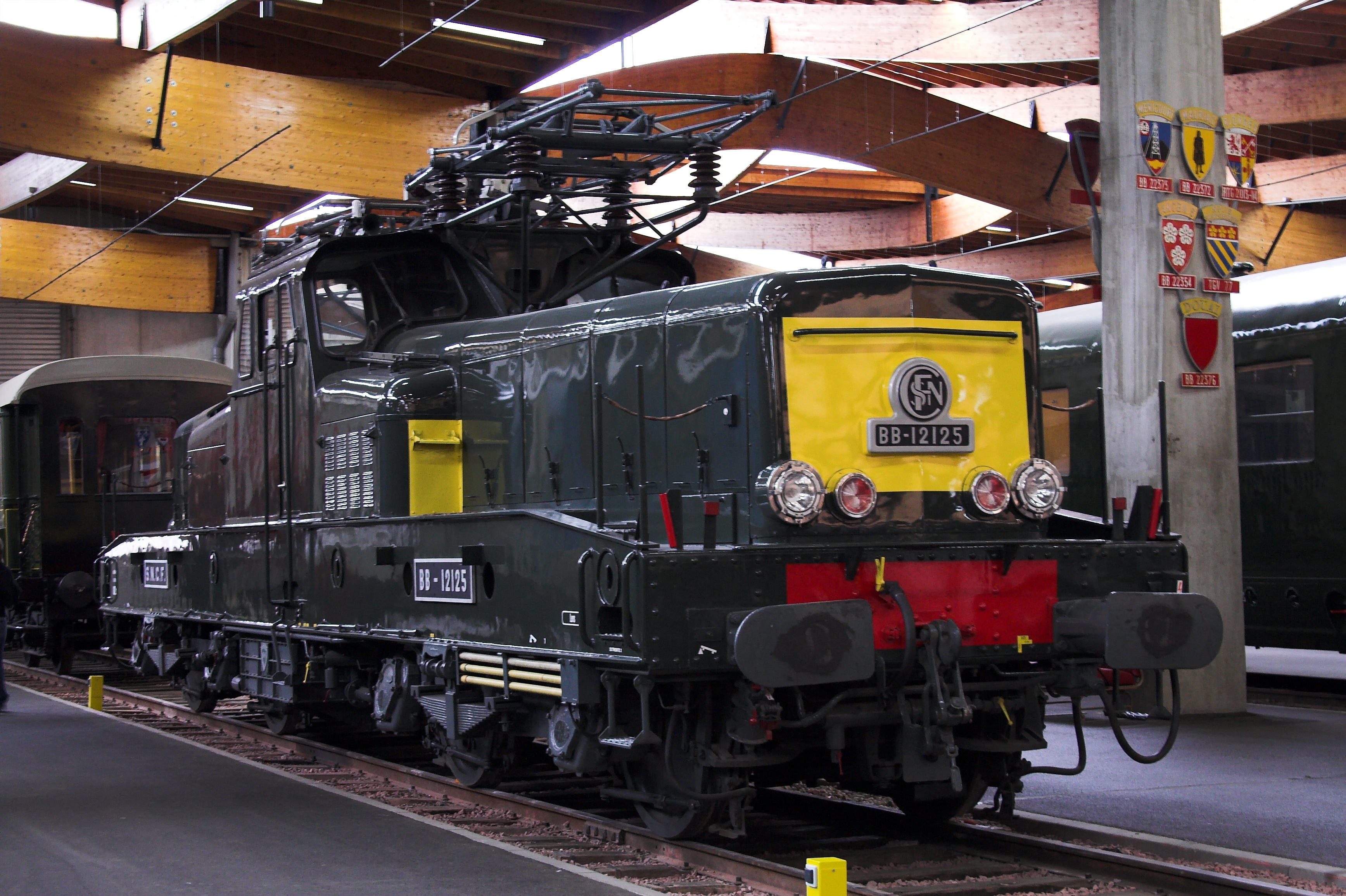 an electric locomotive BB-12125 (BB-12000) at Cité du Train de Mulhouse(Mulhouse, France)